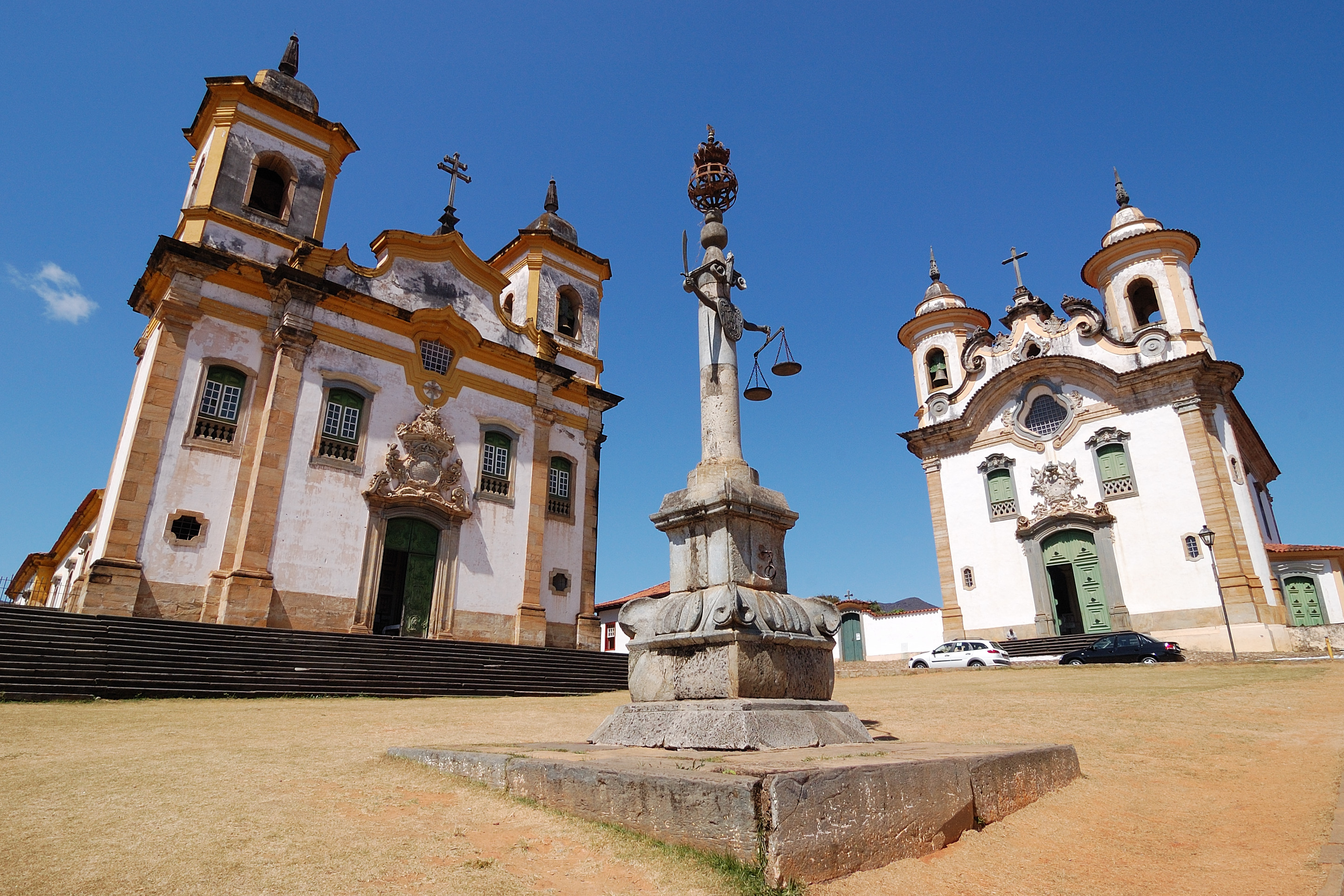 Mariana, Brazil [2011]